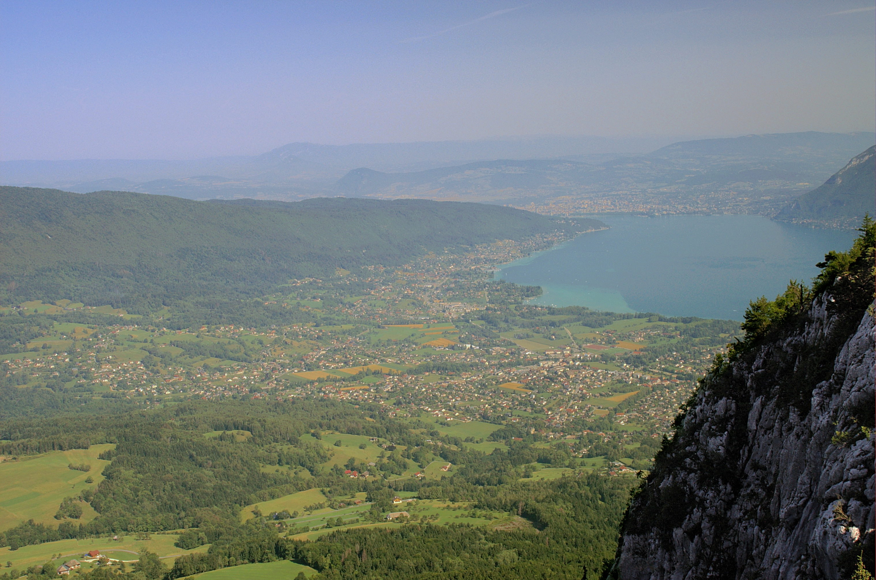 L'agglomération saint-jorienne vue depuis les hauteurs du Roc des Bœufs. On distingue plus loin Sevrier puis Annecy.